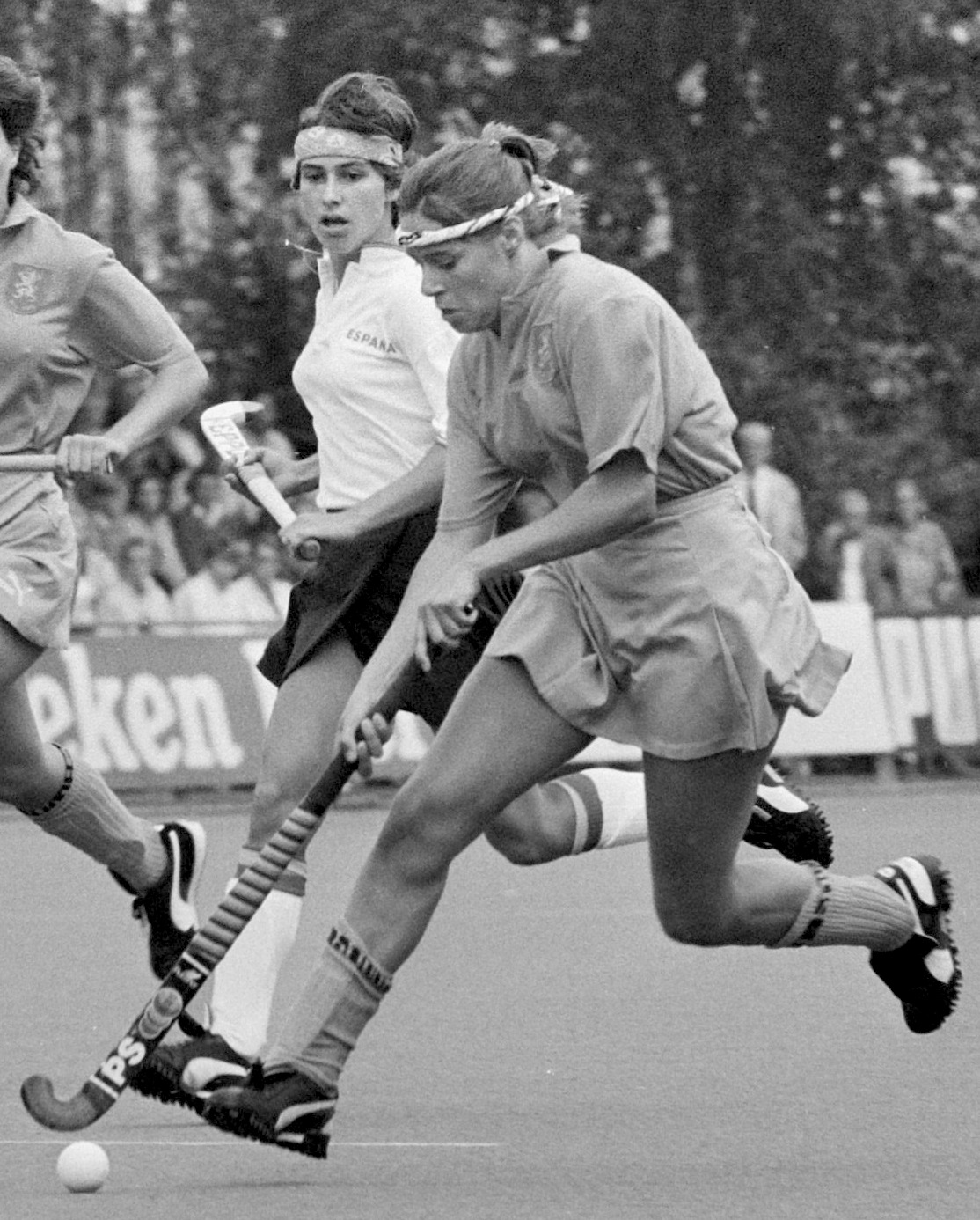 Wereldkampioenschappen hockey dames in Amstelveen: Martine Ohr (r) in actie